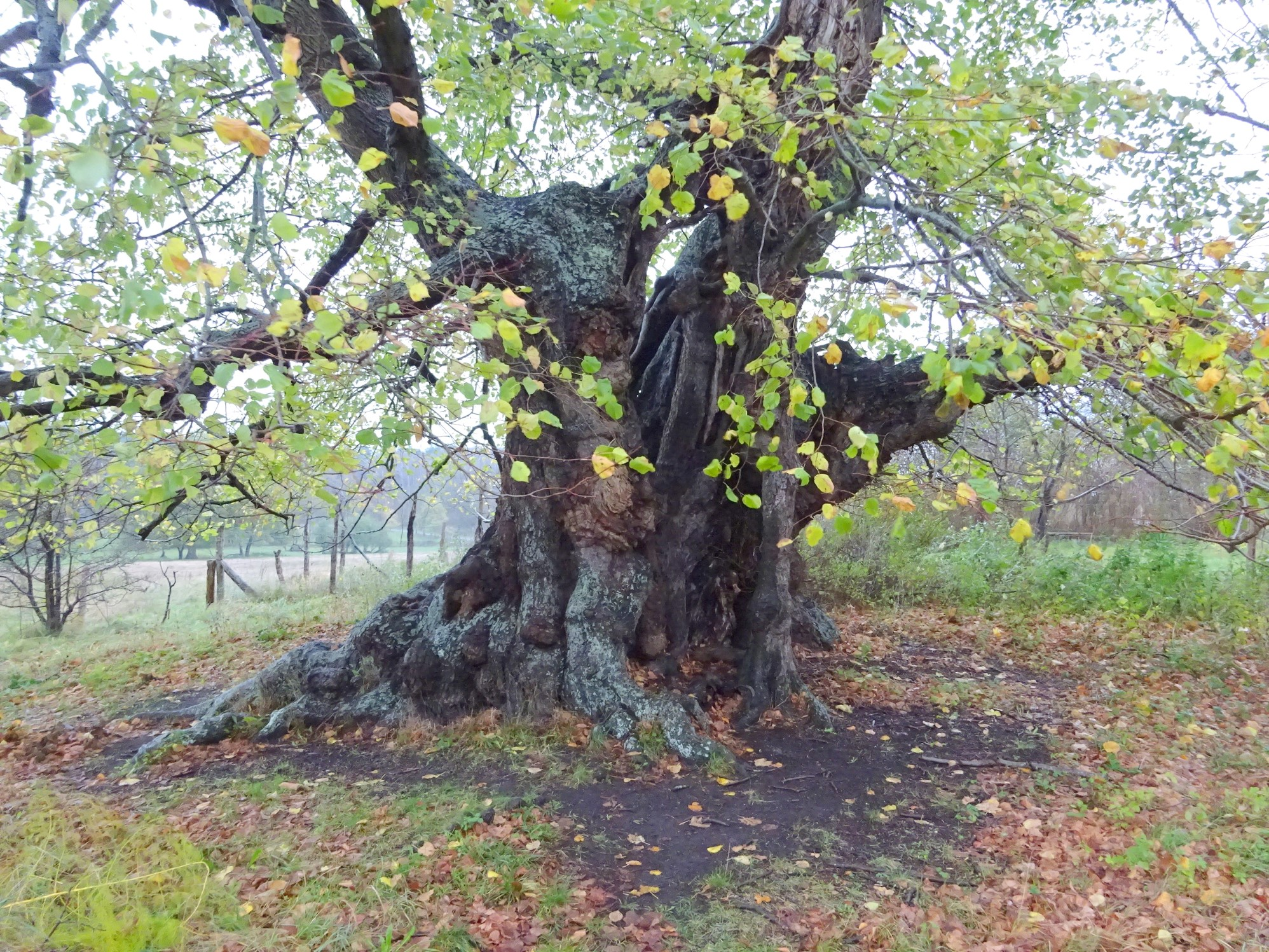 Dorflinde in Speck (17192 Kargow)